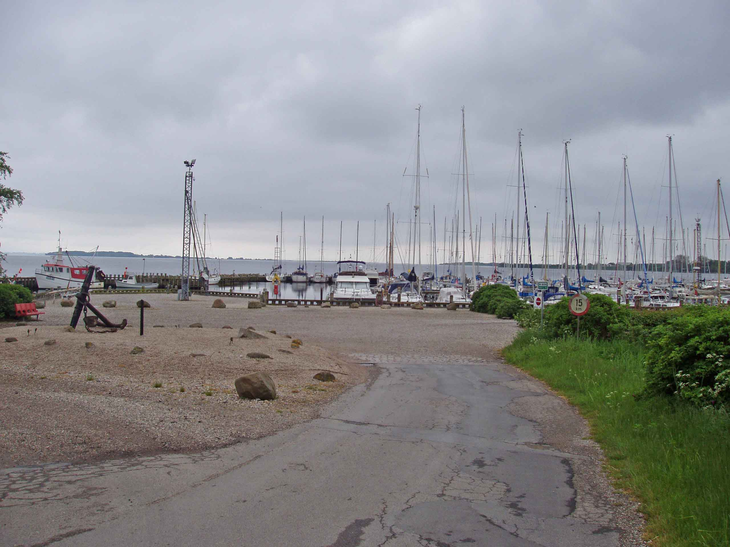 Fjellebroen Havn